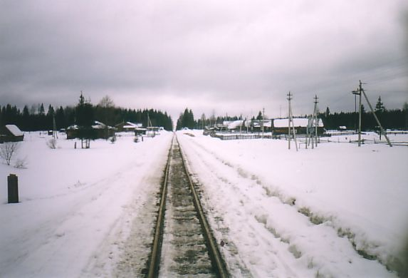 Центр посёлка 6 километр. Вид в западном направлении. Семигородняя УЖД. Харовский район, Вологодская область.